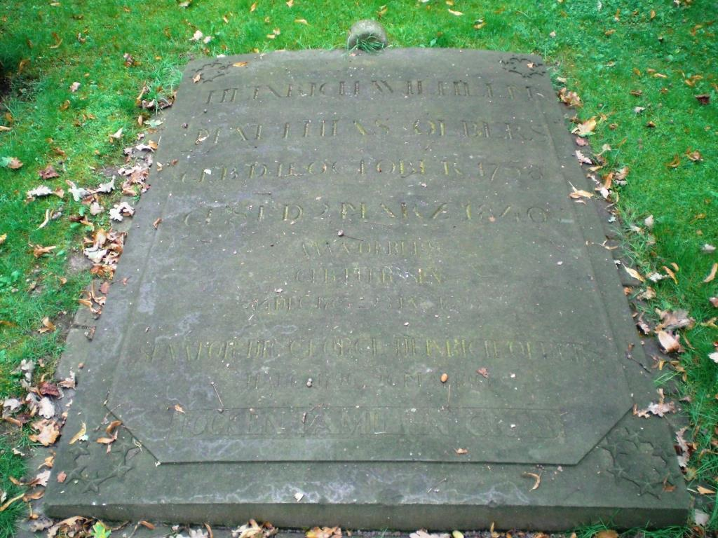 Grab des Arztes und Astronomen Heinrich Wilhelm Olbers (1758-1840) auf dem Riensberger Friedhof in Bremen